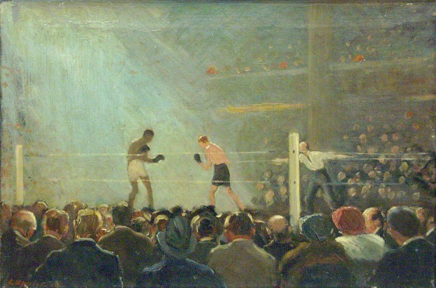 Ernst Oppler: Boxkampf (im Berliner Sportpalast), 1920, Öl auf Leinwand, 45 x 65 cm. Gezeigt auf der Ausstellung "Max Liebermann - Vom Freizeitvergnügen zum modernen Sport", 2016